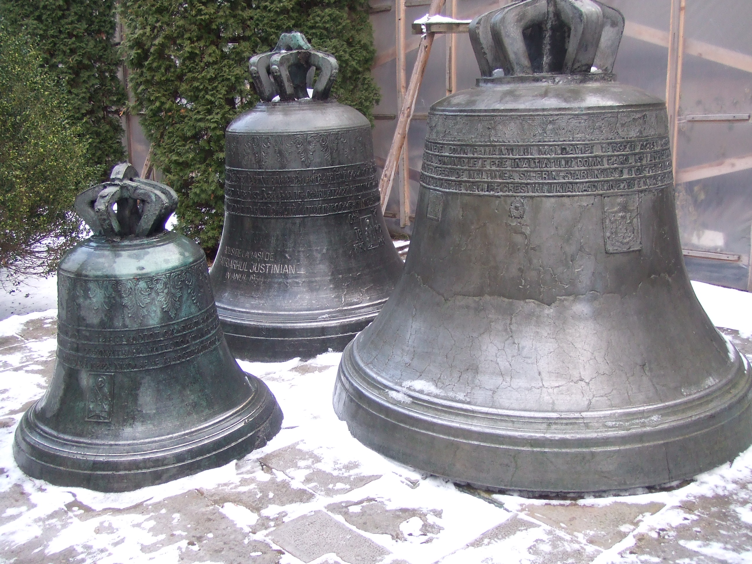 Mănăstirea Sfinţii Trei Ierarhi din Iaşi